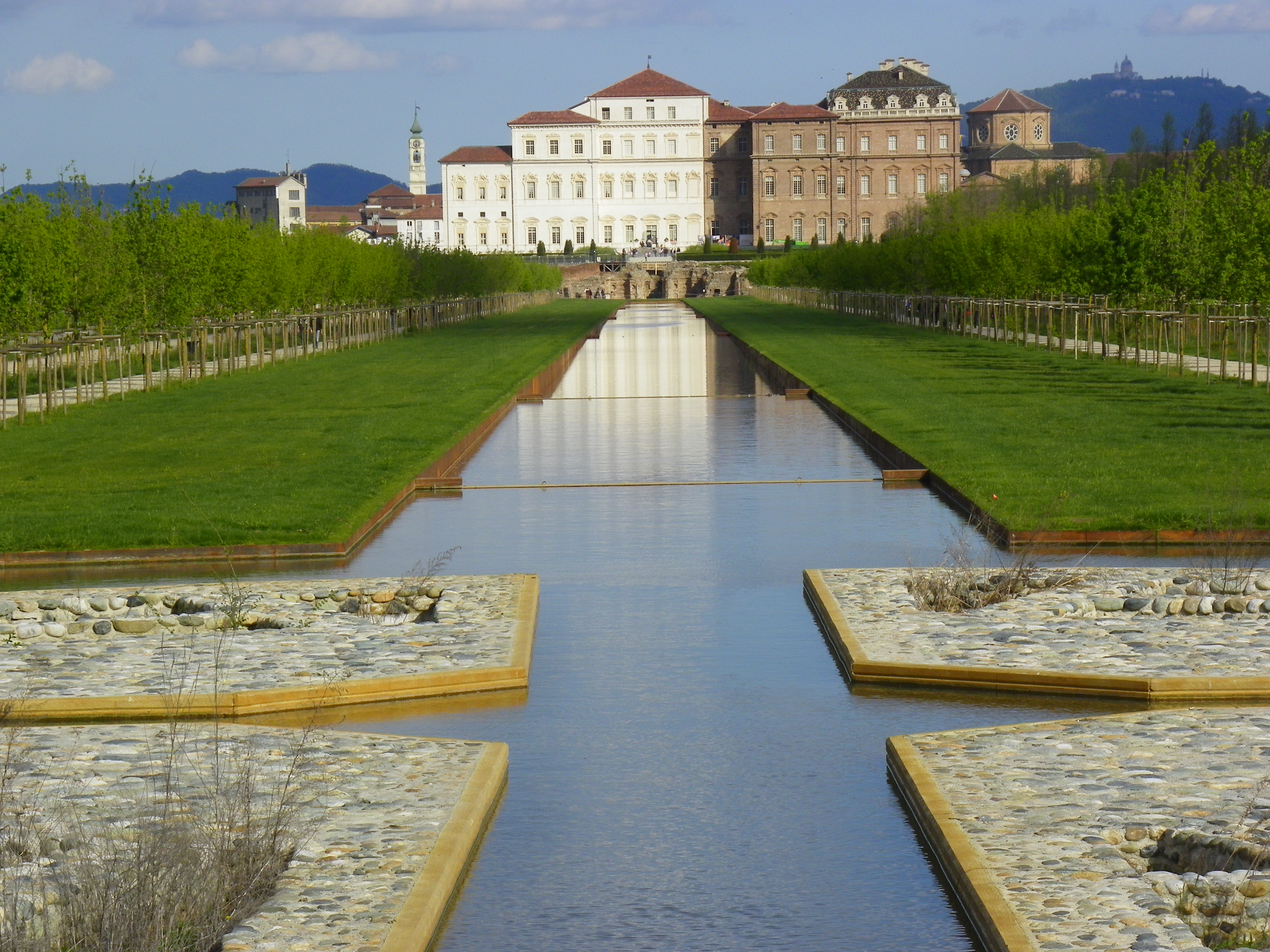 Il castello visto dal parco